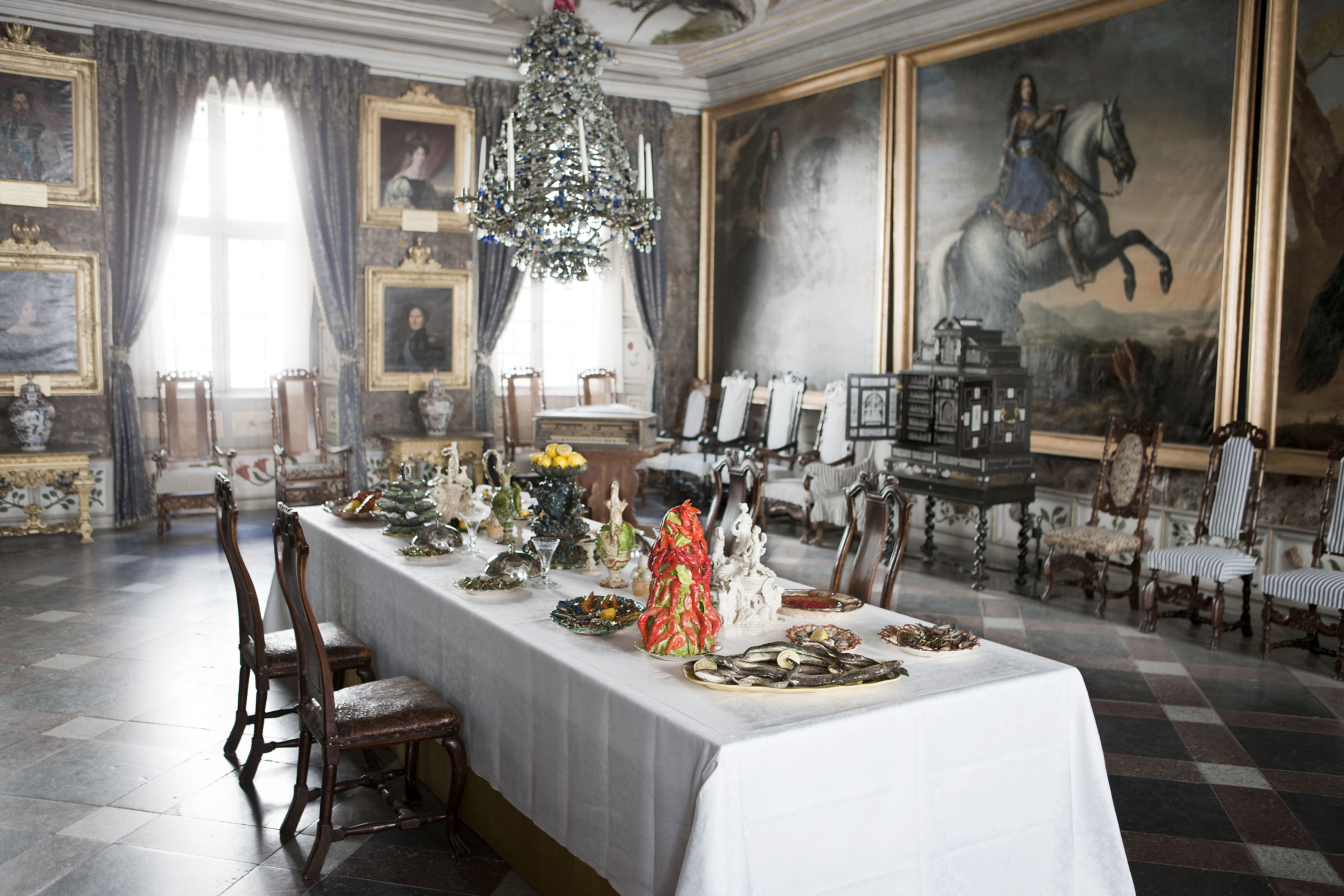 Barockbord i slottets Kungssalen samt kungaporträtten. Stuckaturtak av Hans Zauch (död 1666) 1663-1664, ljuskrona med gjutna pärlor och hängen av glas tillverkad i början av 1670-talet på Jungs glashytta av Melchior Jung (1615-1678) och den hänger i Kungssalen sedan 1672.